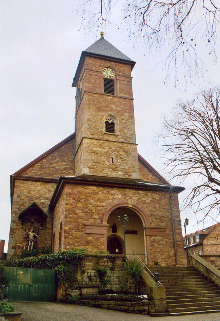 Sankt Birgitta, Kirche im Weinbrenner-Stil (der badischen Variante des Klassizismus). Erbaut 1830 nach Entwurf von Wilhelm Vierordt.